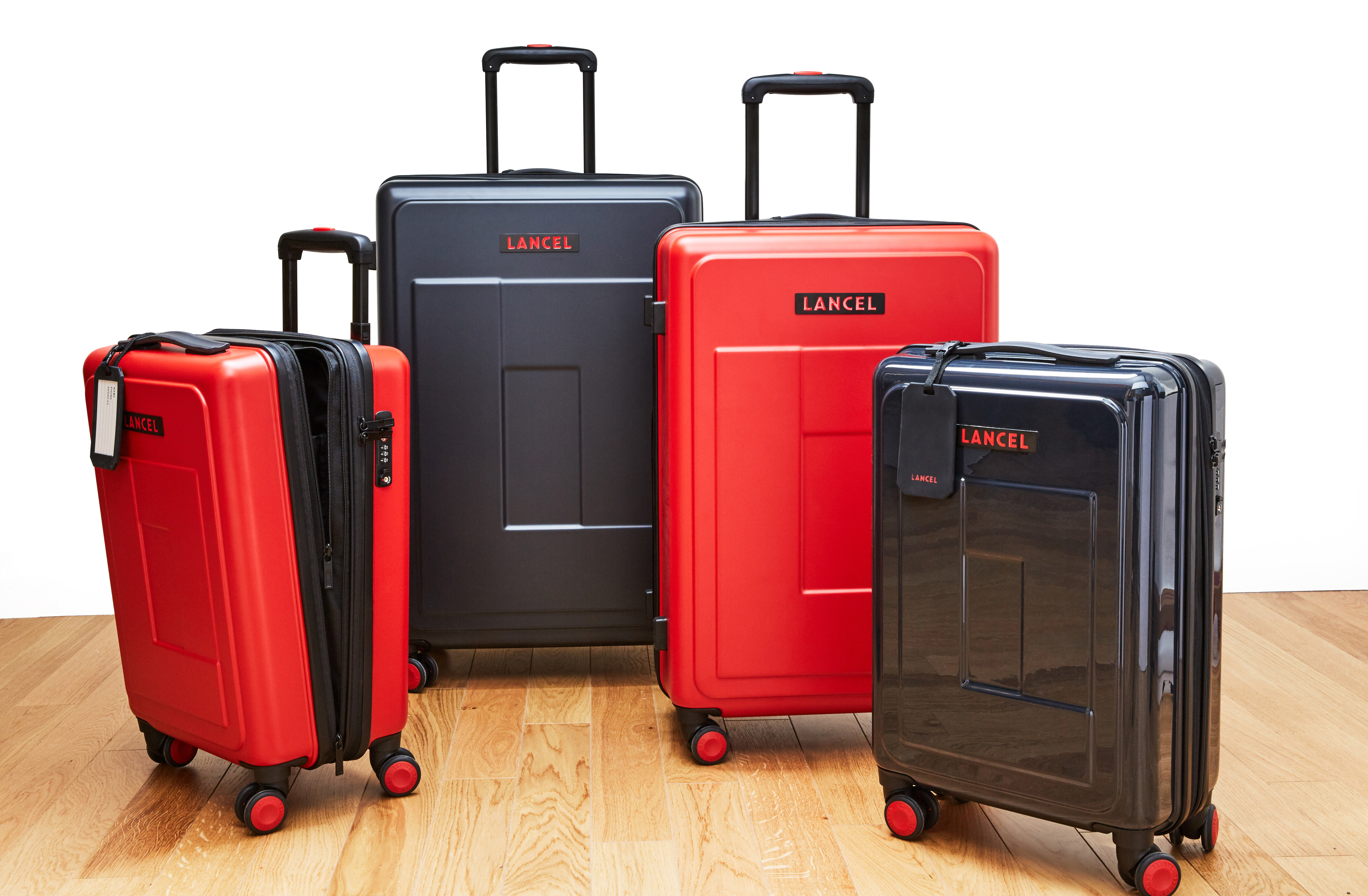 Collection de valises Lancel